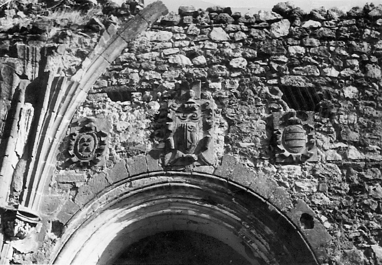 Emplazamiento original de los escudos de los patronos fundadores de la capilla de Santiago en la iglesia de Santa Catalina. Actualmente en la iglesia parroquial de Fuenllana.